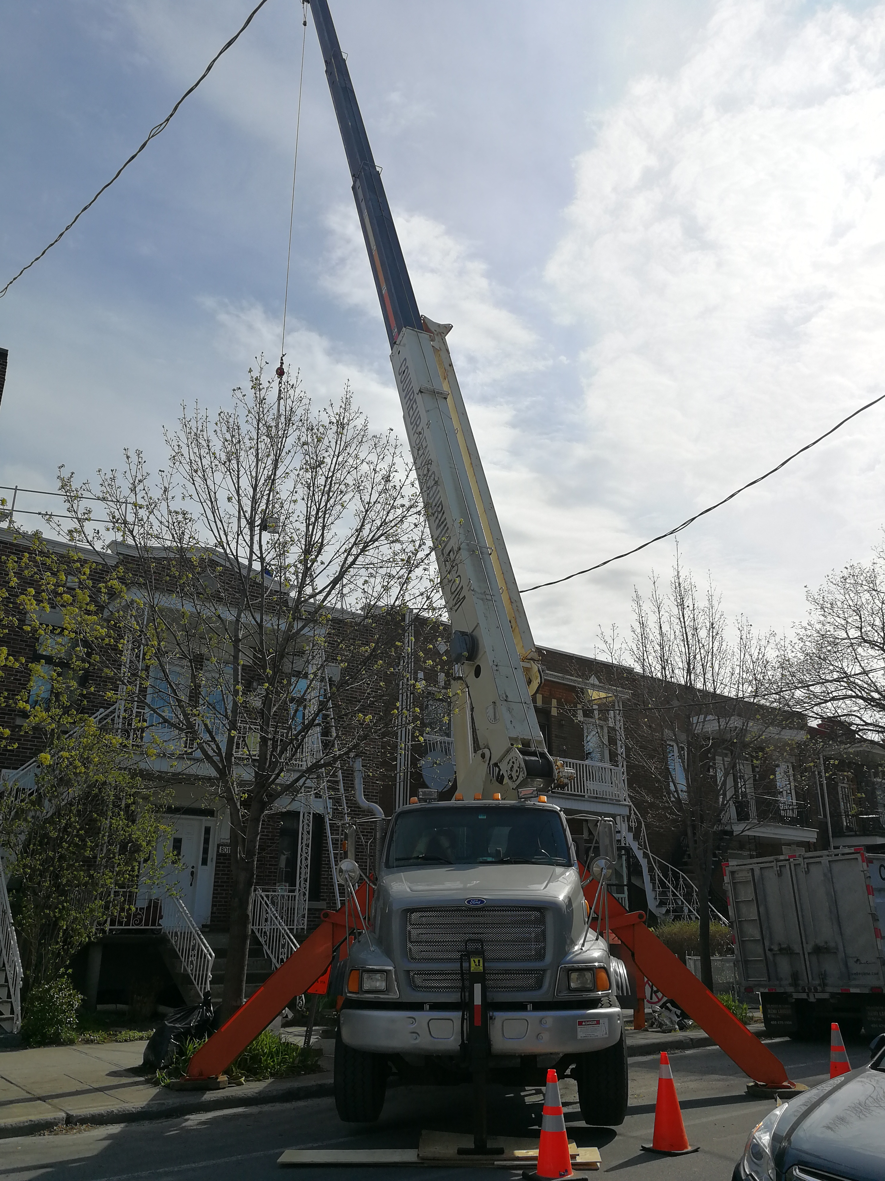 Camion-grue de face, avec grue déployée